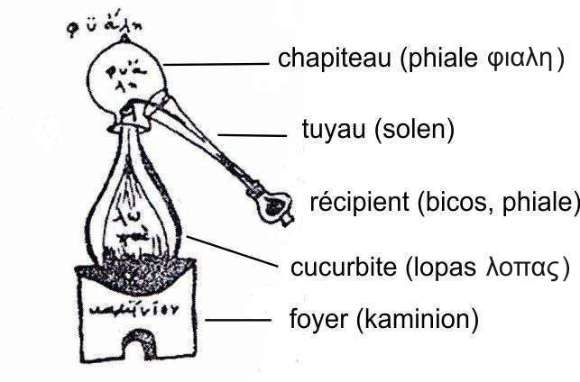 Dessin d'alambic des manuscrits alchimiques grecs (Laurentianus graecus 86, 16 fol.85r), avec une légende moderne